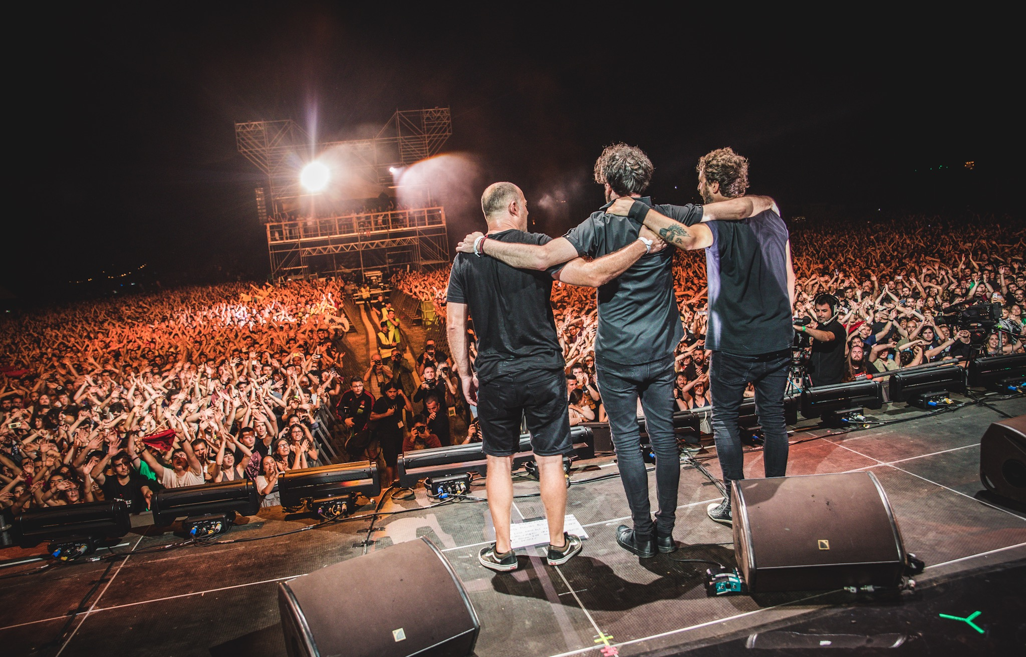 Berri Txarrak Lagunartean kontzertuaren irudiak. Kobetamendin, 2019ko uztailaren 14a. Gaizka Peñafielen argazkiak. Argazkiak edozein erabilerarako libre utzi ditu hemen aitortu duenaren arabera